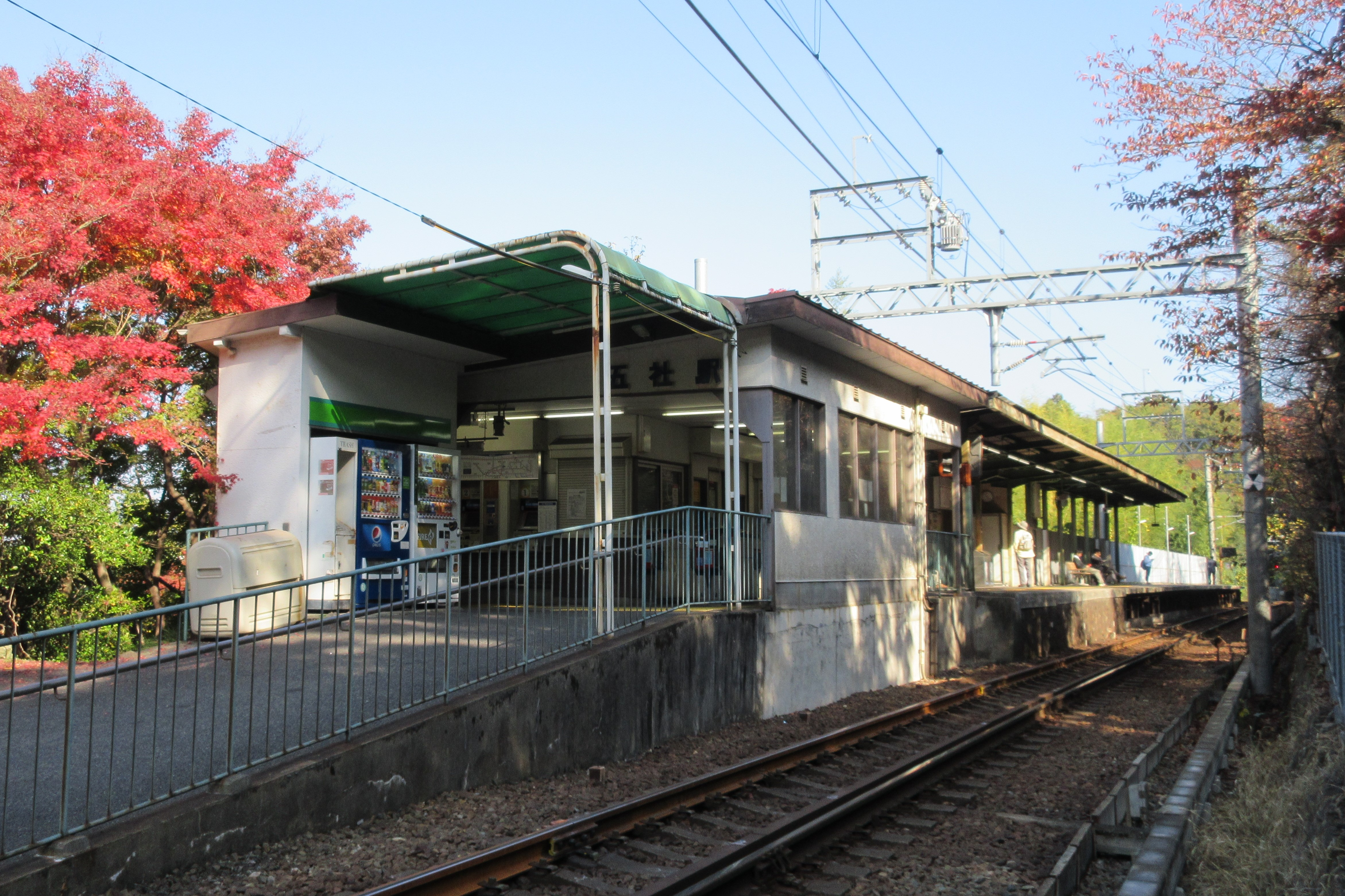 神戸電鉄五社駅